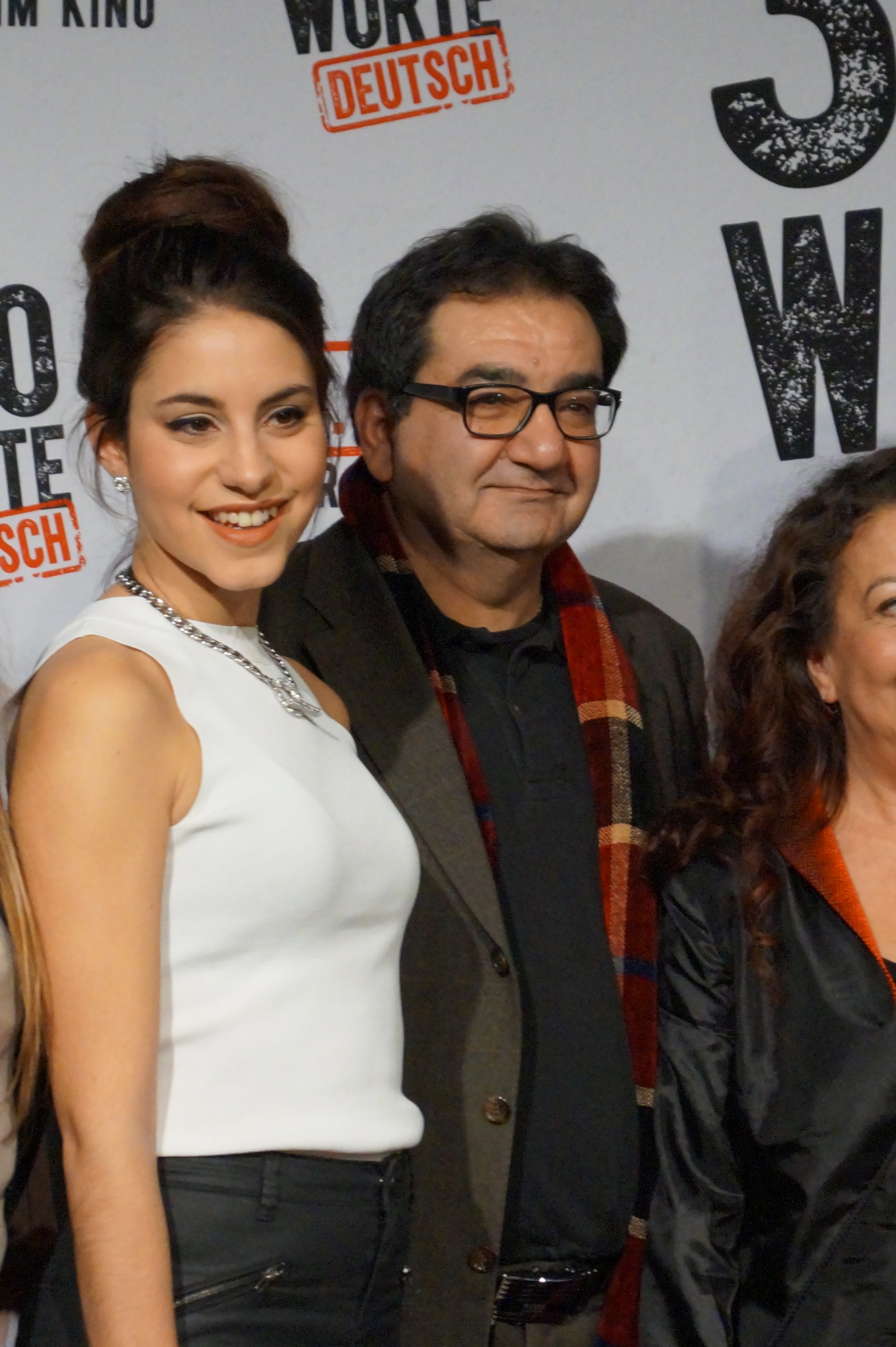 Almila Bagriacik bei der Premiere von "300 Worte Deutsch", Januar 2015